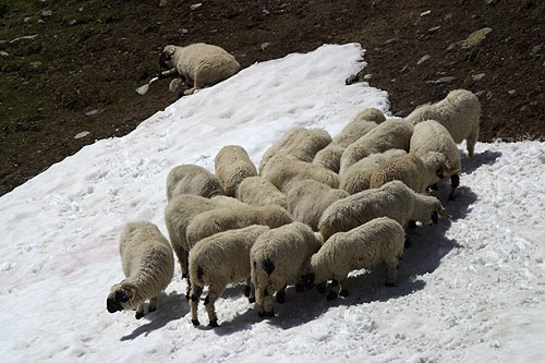 Schafherde